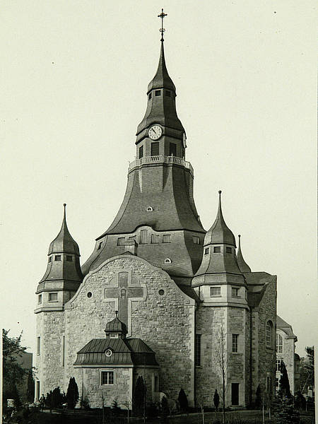 evangelisch-reformierte Kreuzkirche in Kassel, erbaut 1904-1906, 1943 zerstört